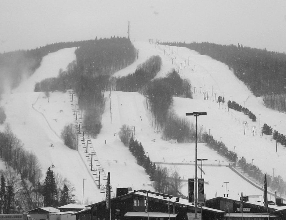 Centre de ski de Stoneham Qc Canada